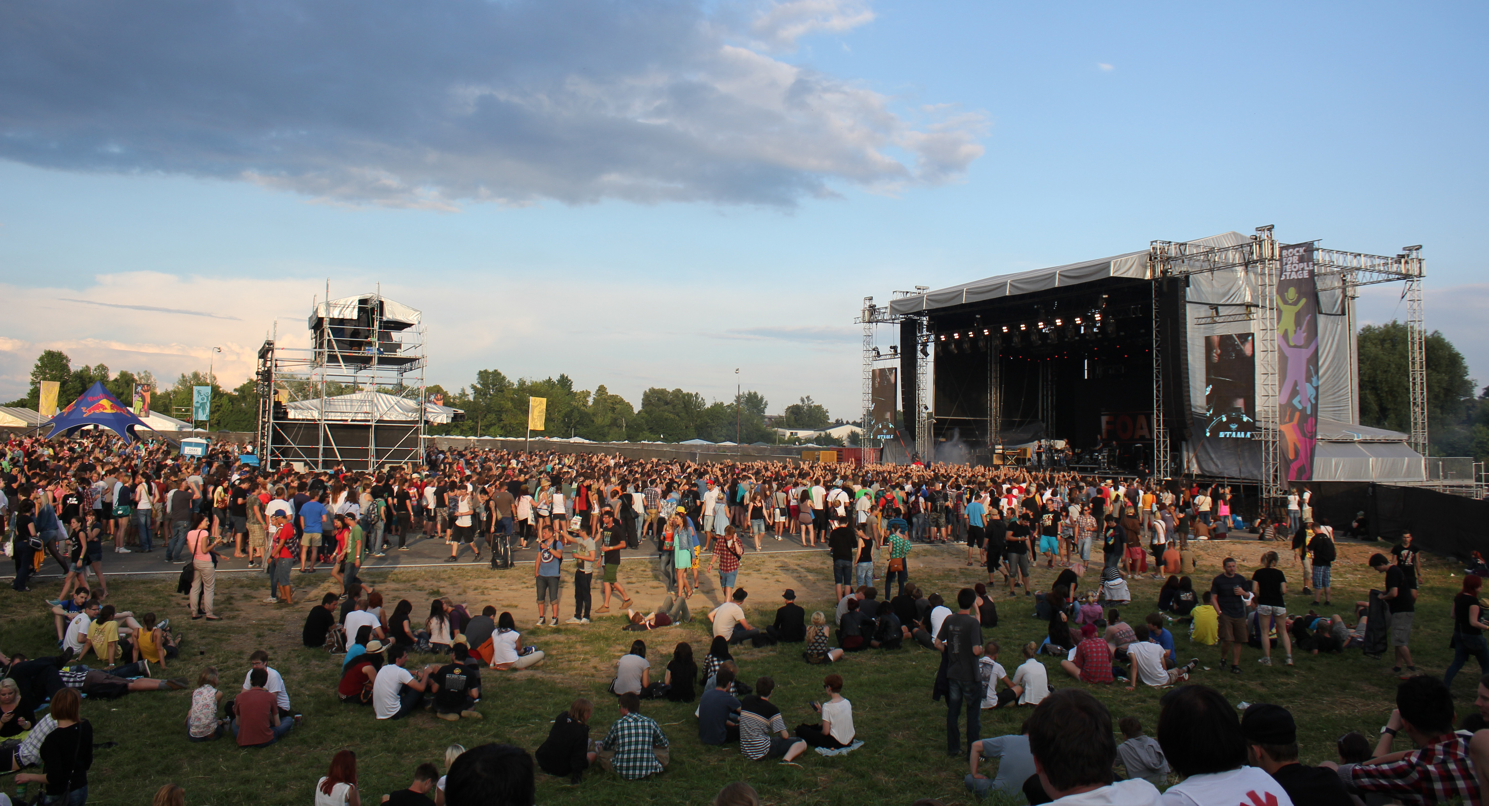 RFP - Festivalpark, Hradec Králové